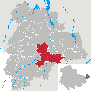 Saara in Thuringia - District Altenburger Land